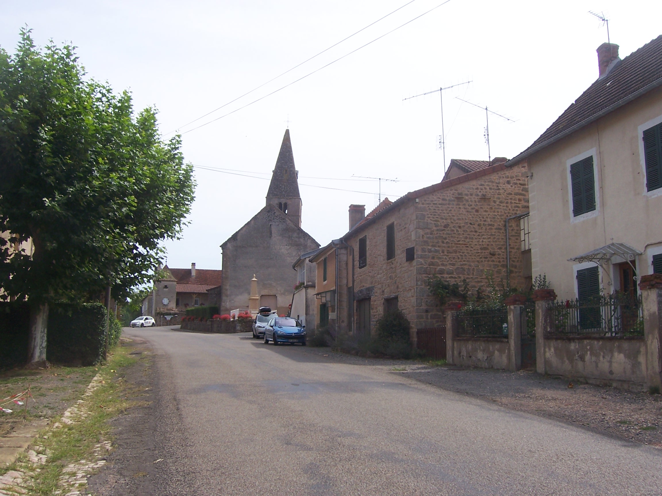 Eglise de Donzy-le-National